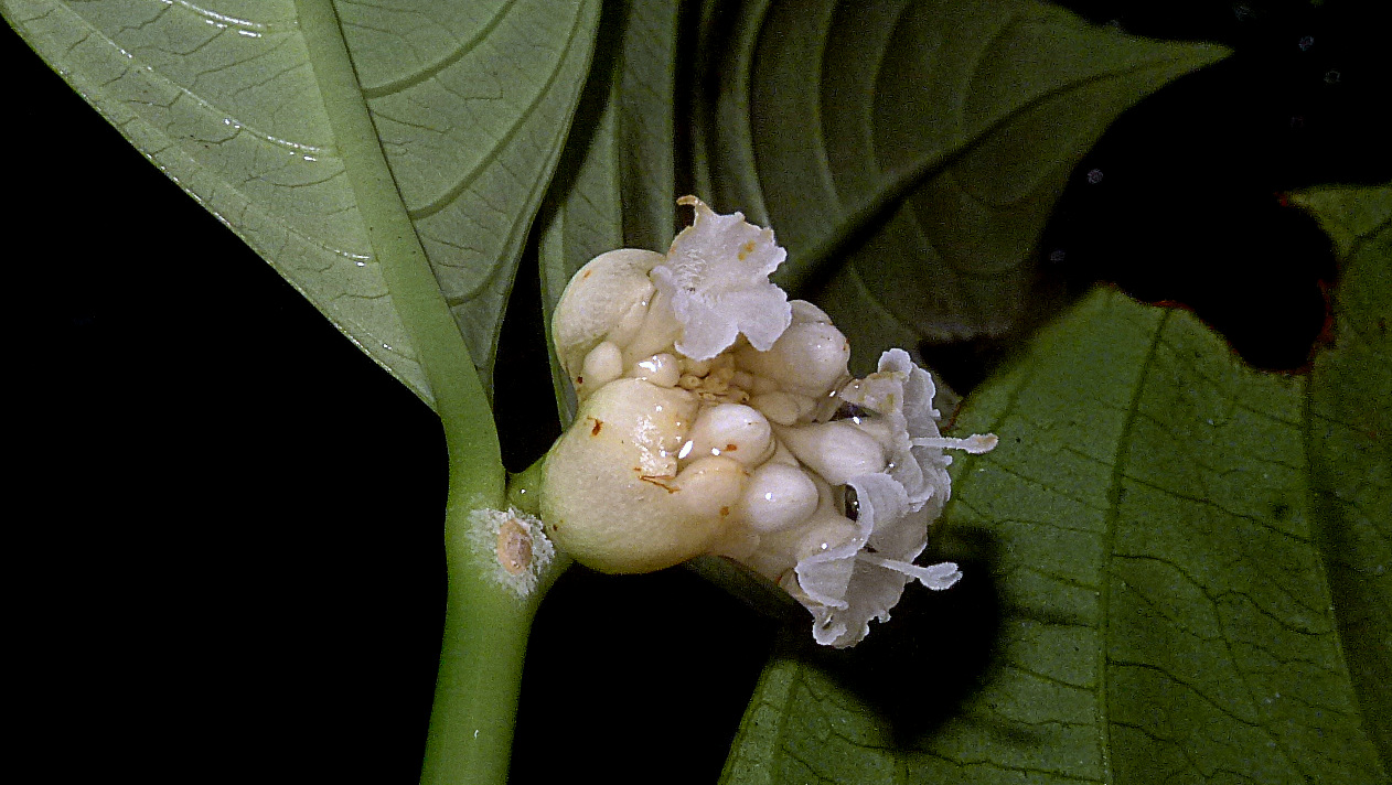 Psychotria platypoda DC.